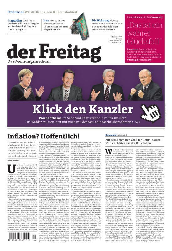 Titelseite des Freitag am 5.2.2009 (Launchausgabe)